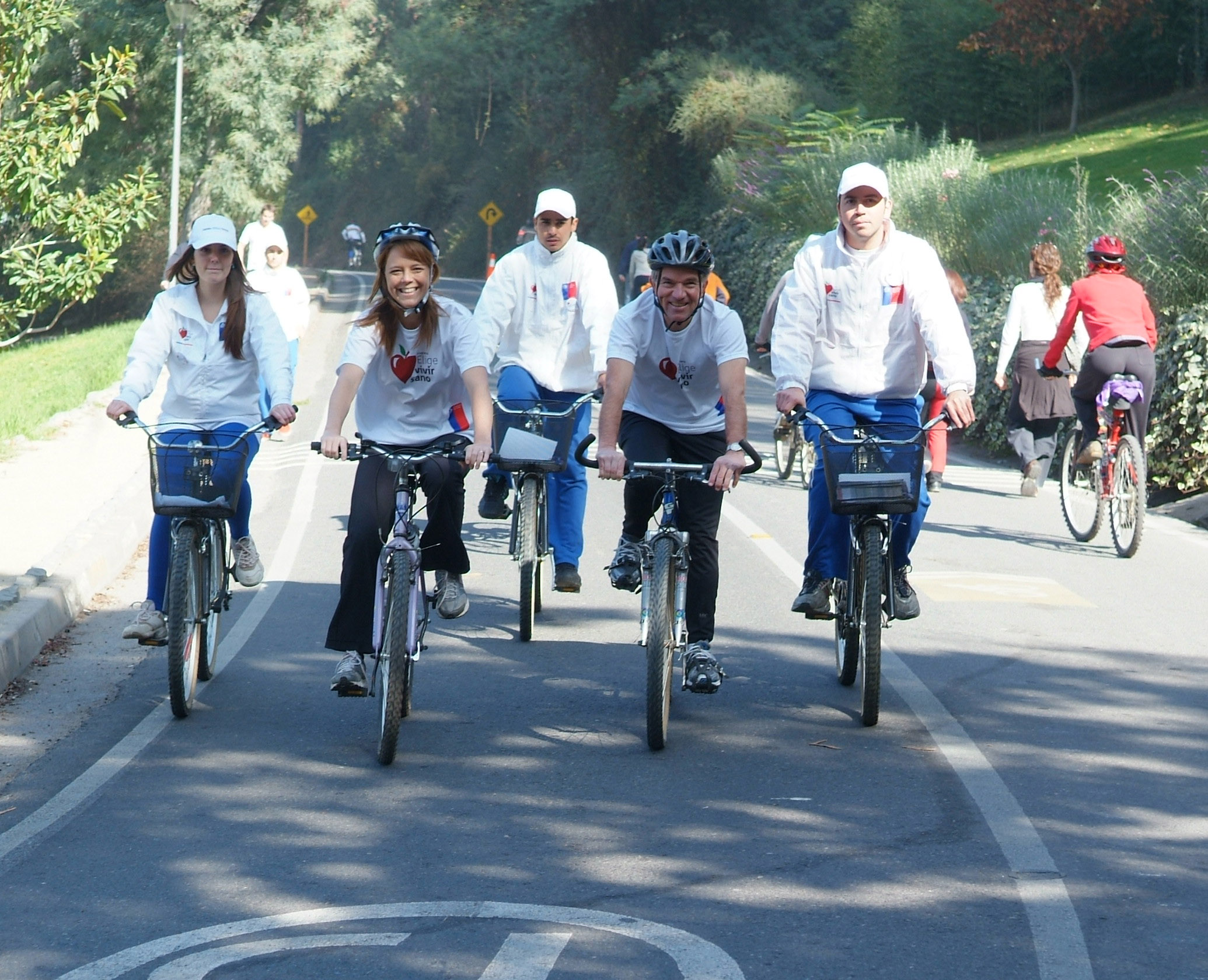 La Ministra Secretaria de Gobierno, Ena von Baer, y el subsecretario de Deportes, Gabriel Ruiz Tagle, encabezarán en el cerro San Cristóbal el lanzamiento del Tour IND, programa deportivo que consiste en 100 corridas y 100 cicletadas en todo Chile, impulsadas por el Instituto Nacional de Deportes y con el apoyo del programa Elige Vivir Sano.